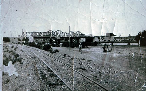 La línea pasaba por Rawson cerca la ribera del río para pasar por el término norte del puente carretero.